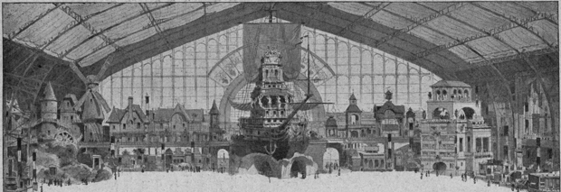 Vista de la Galería de la Máquinas durante la Exposición de 1900.